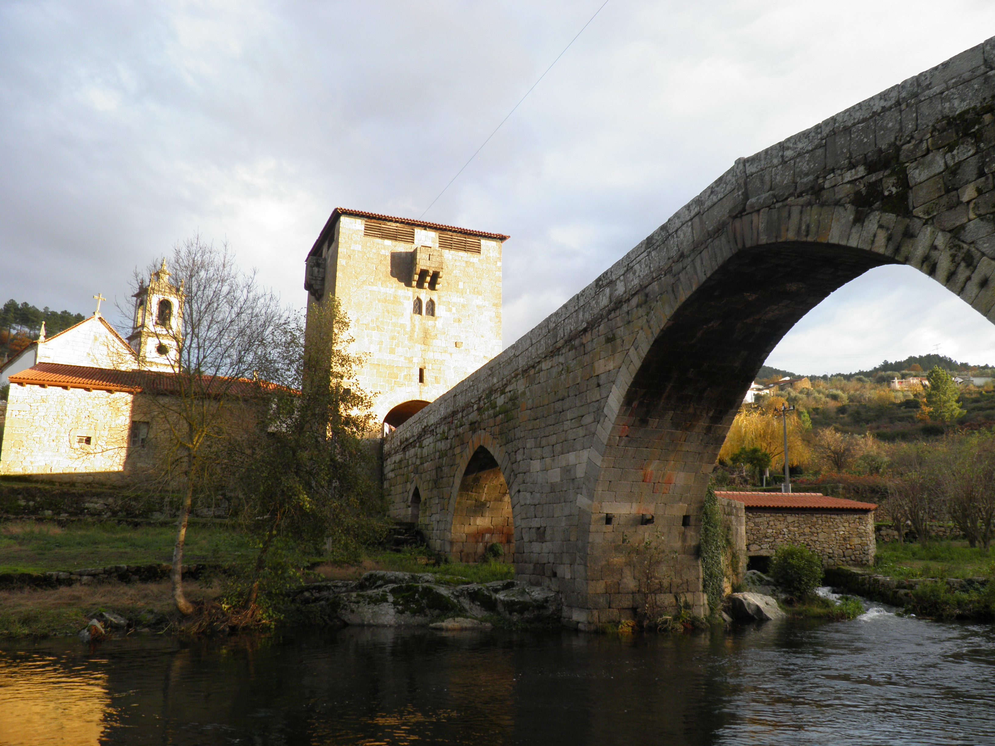 Torre de Ucanha, Tarouca.